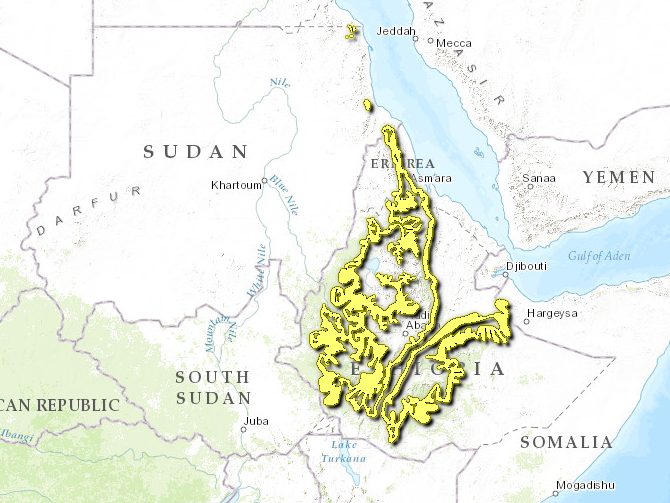 Mappa Ecoregione AT0110 - Foreste montane dell'Etiopia